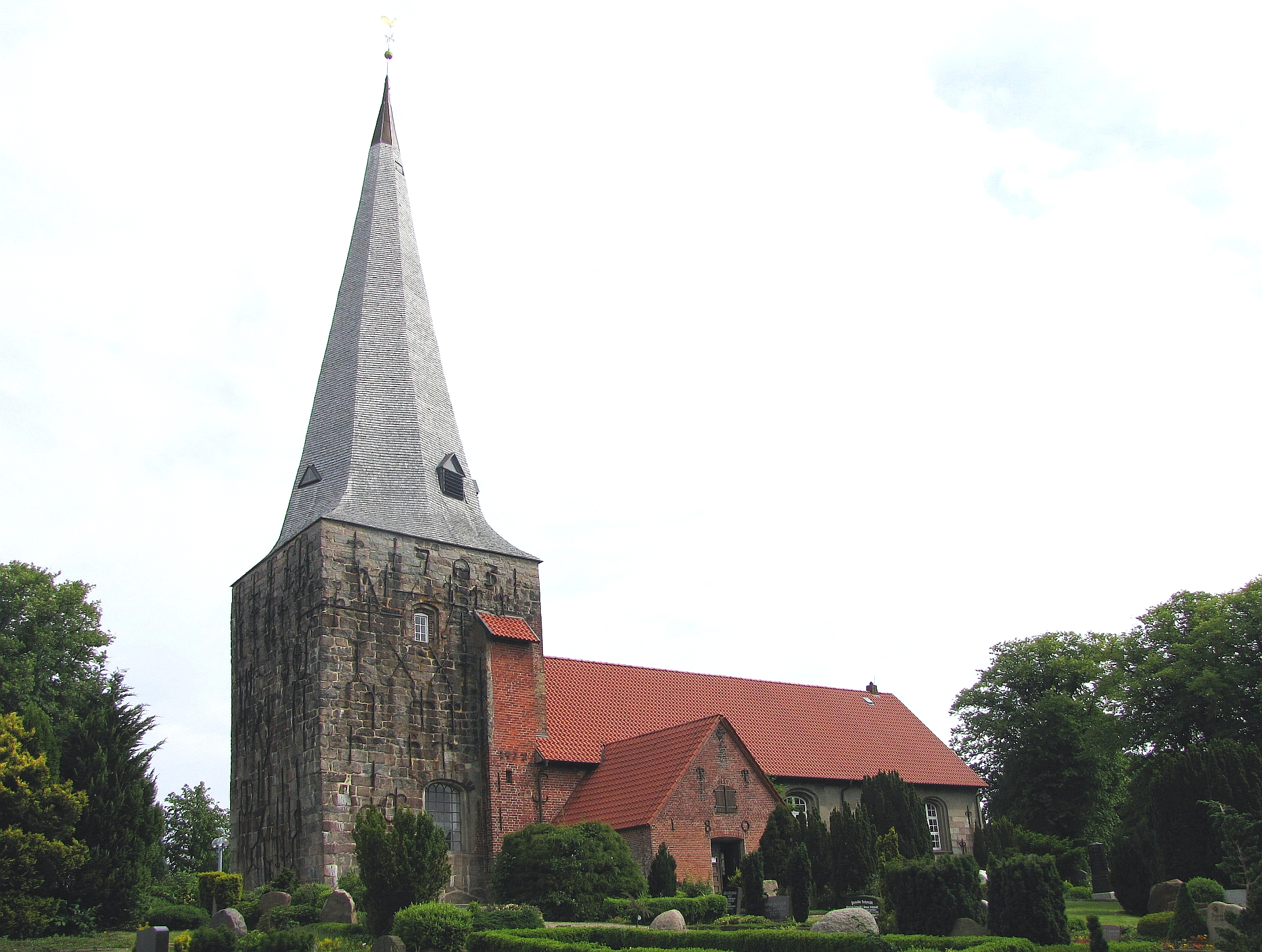 Husby die St-Vicentius-Kirche aus Natursteinmauerwerk (Granit) mit späterer Verlängerung des Kirchenschiffs - Foto 2012 Wolfgang Pehlemann IMG_7882